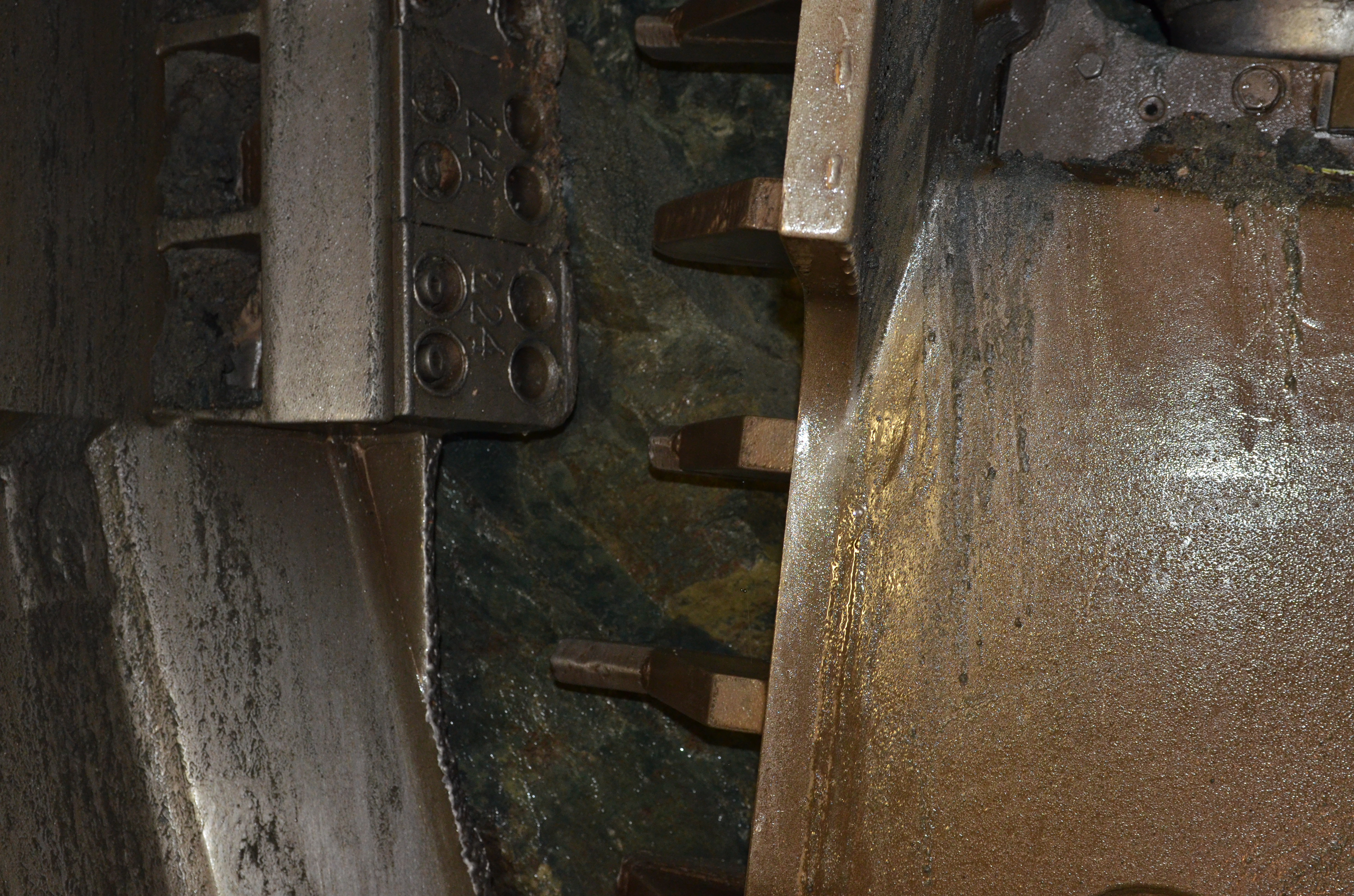 Foto: Louise Andersson/Näringsdepartementet